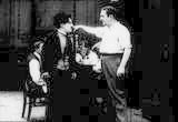 escena de la película de Charles Chaplin The Masquerader (1914)